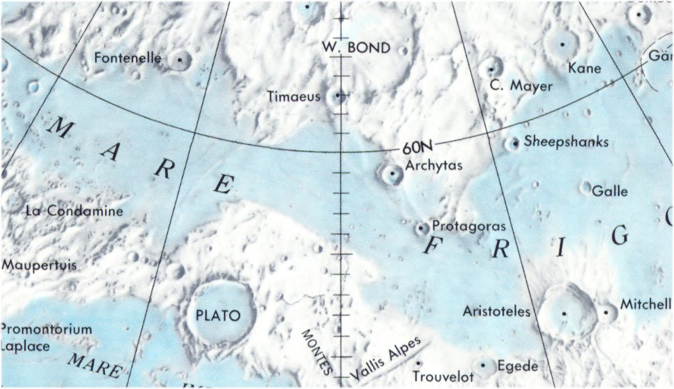 Cráter lunar Protágoras. Localización. (Lunar Chart LPC1. Second Edition)